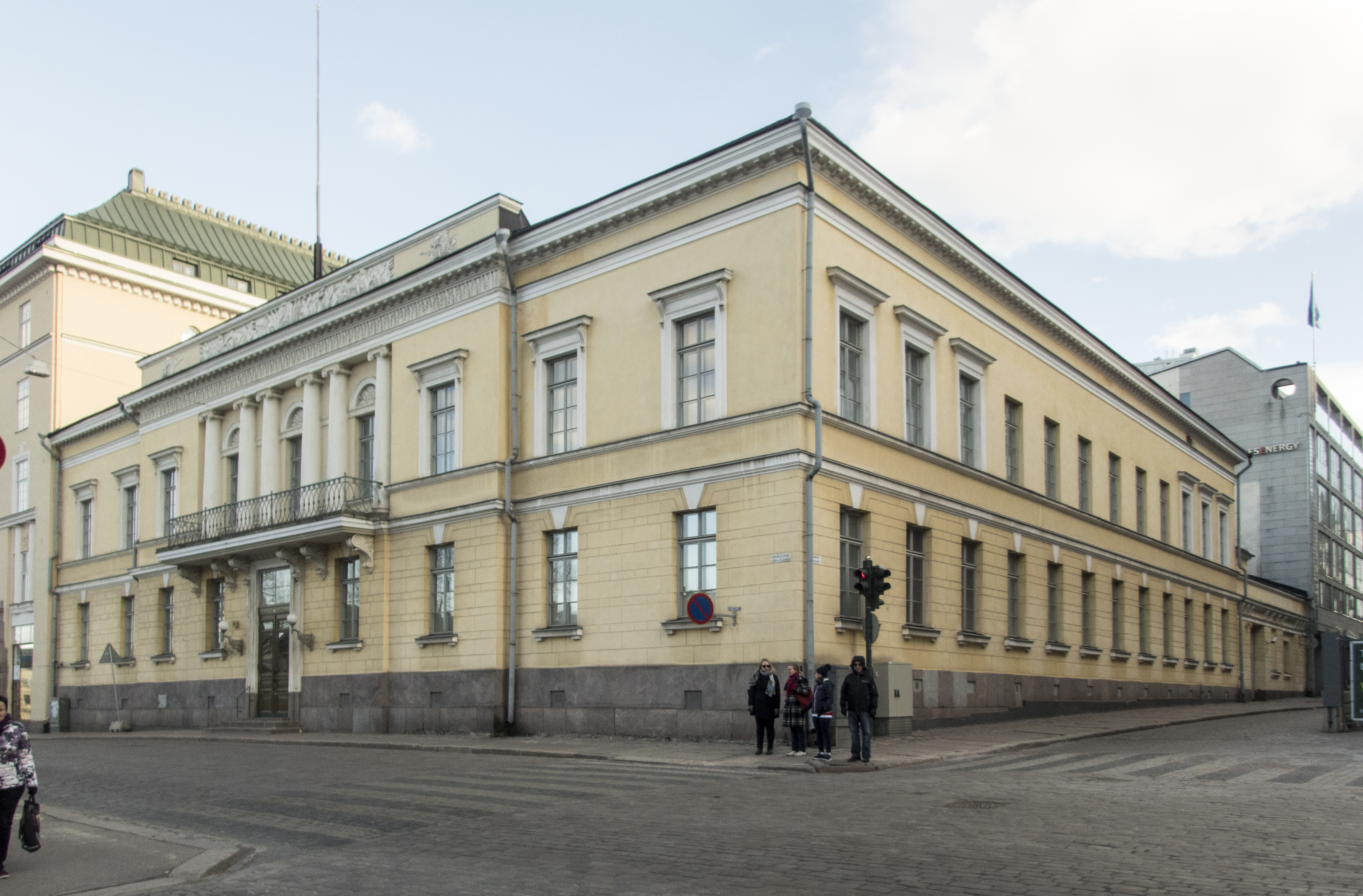 Smolna, Helsingfors Huset är uppfört 1820-1822 i empirstil av arkitekt Carl Ludvig Engel